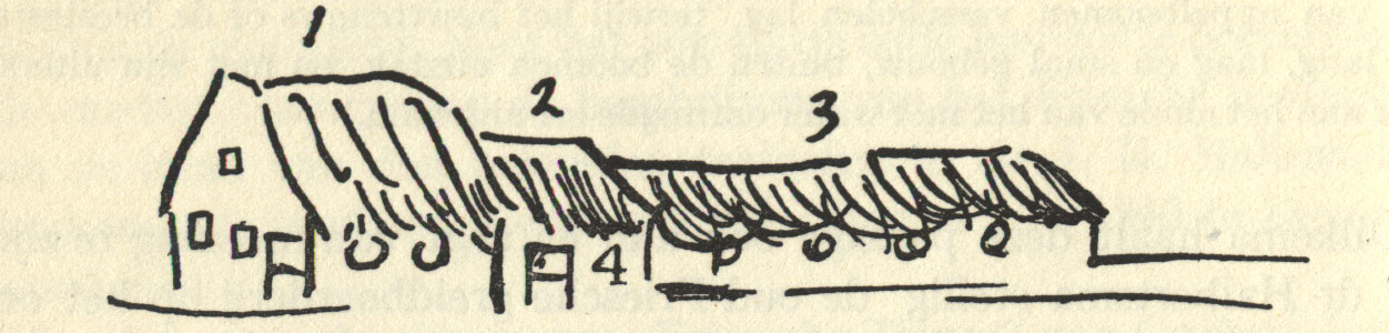 Ruwe schets van een Fries Langhuis uit een nog ongedateerd handschrift van rond 1850 van J.H. Halbertsma.